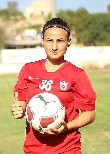 Konak Belediye Spor